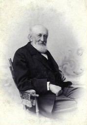 Alois Mikyška (1831 - 1903), Český právník a politik.